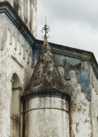 Capela localizada na Usina Nossa Senhora das Maravilhas, na cidade de Goiana, Pernambuco